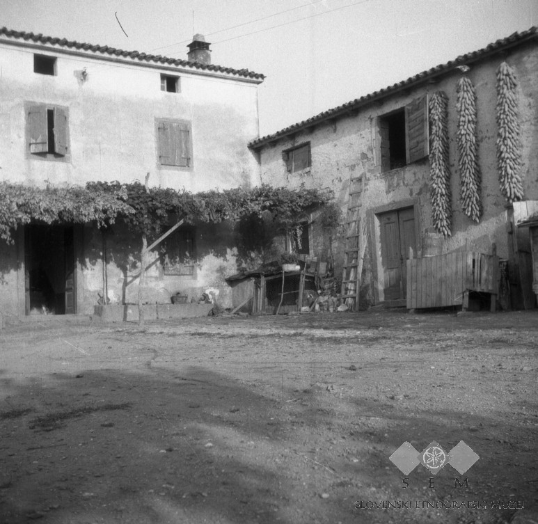 Pročelje hiše in štala (hlev), frmenton (koruza) se suši, "Čicka" Škofije.